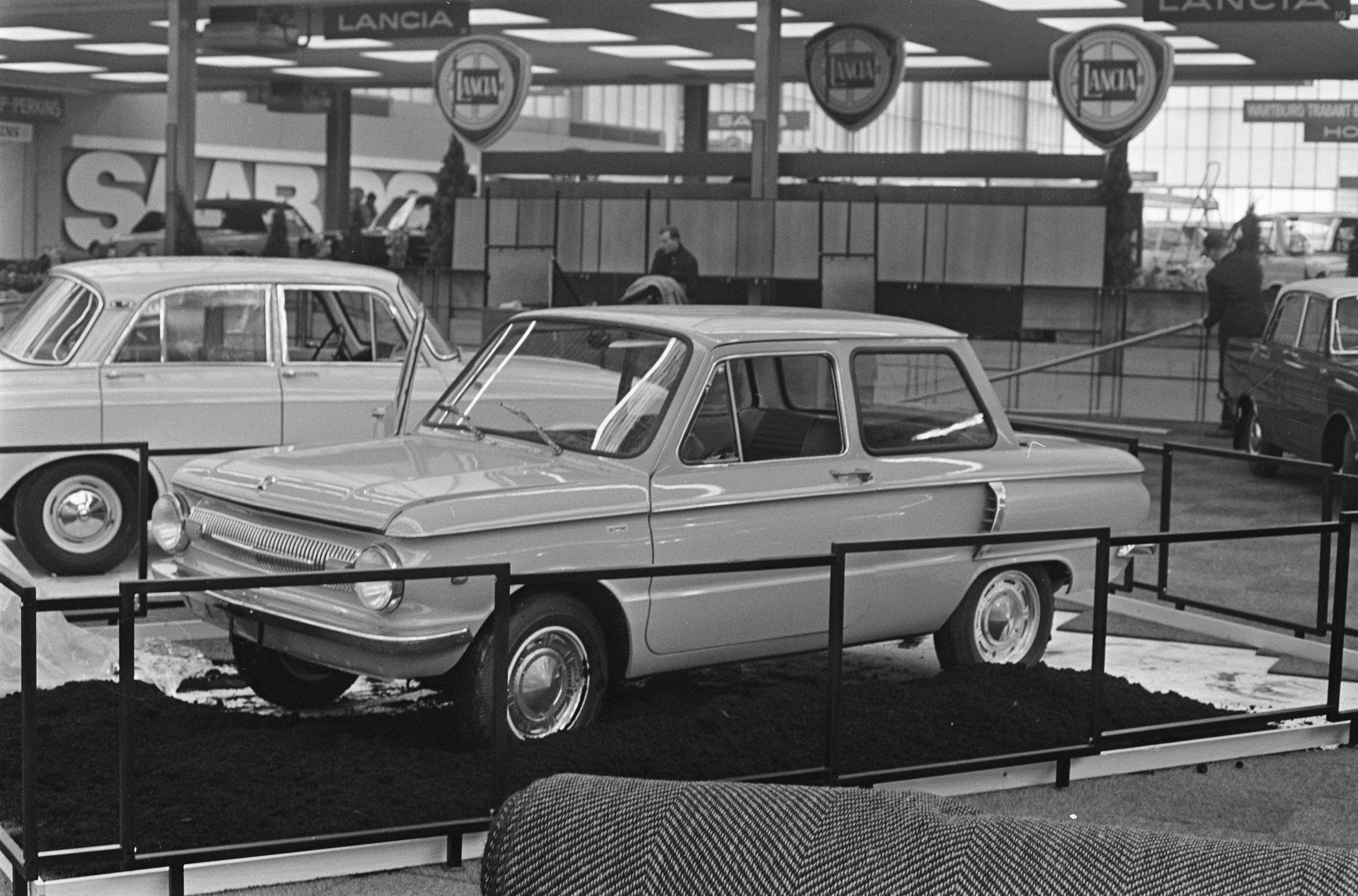 Collectie / Archief : Fotocollectie Anefo Reportage / Serie : [ onbekend ] Beschrijving : Aanstaande donderdag begint 58e RAI tentoonstelling van personenauto's Datum : 11 februari 1969 Locatie : Amsterdam, Noord-Holland Trefwoorden : auto's, autohandel, beurzen, tentoonstellingen Instellingsnaam : RAI Fotograaf : Verhoeff, Bert / Anefo Auteursrechthebbende : Nationaal Archief Materiaalsoort : Negatief (zwart/wit) Nummer archiefinventaris : bekijk toegang 2.24.01.05 Bestanddeelnummer : 922-0917